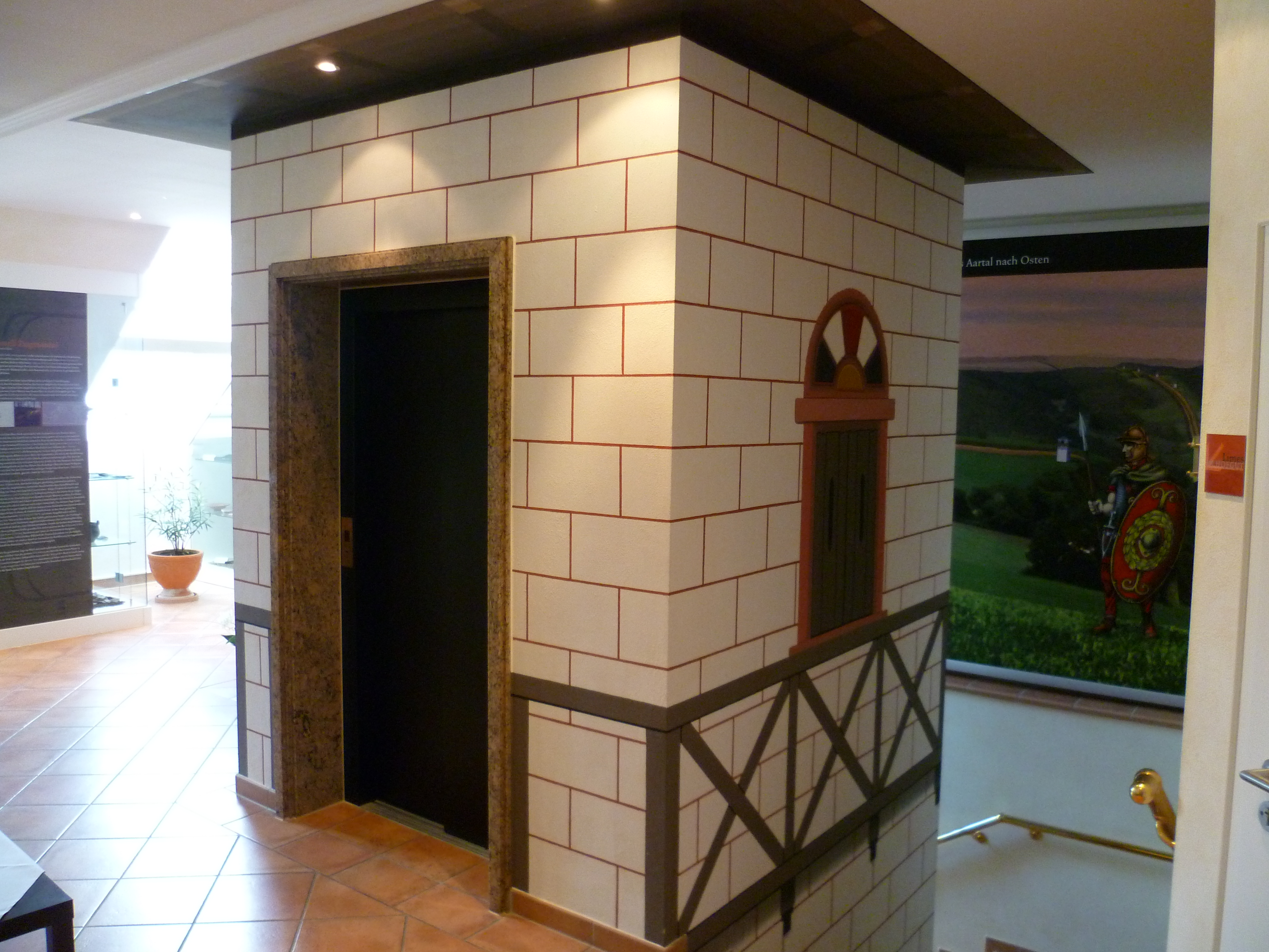 Aufzug an der Limesausstellung am Hofgut Georgenthal